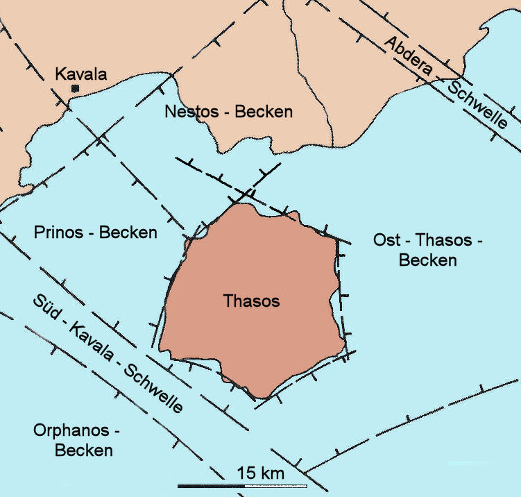 Darstellung von Bruchtektonik und -Becken im Bereich der Insel Thasos